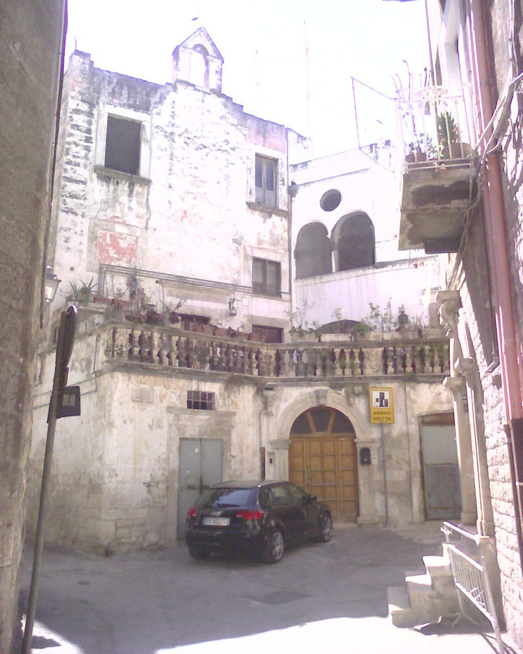 palazzo cesena-Modugno (Bari) - Italy